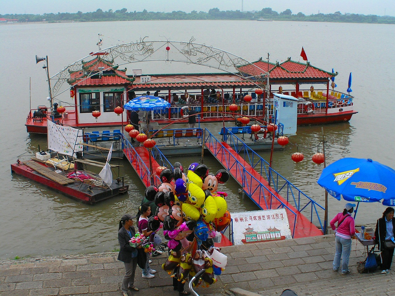 松花江乗船場－太陽公園